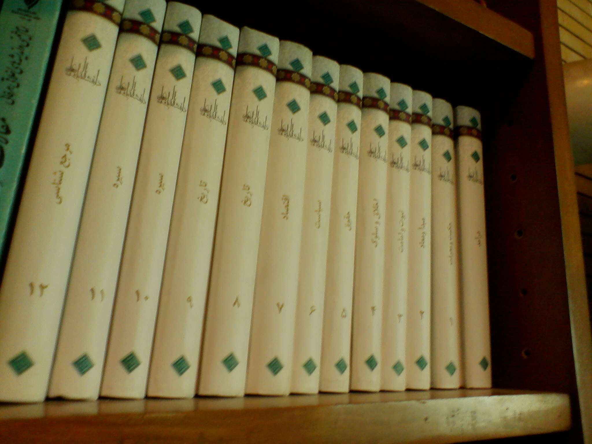 دانشنامه امام علی علیه السلام